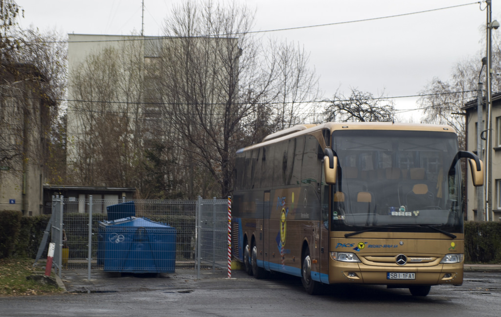 Mercedes-Benz Tourismo 17RHD